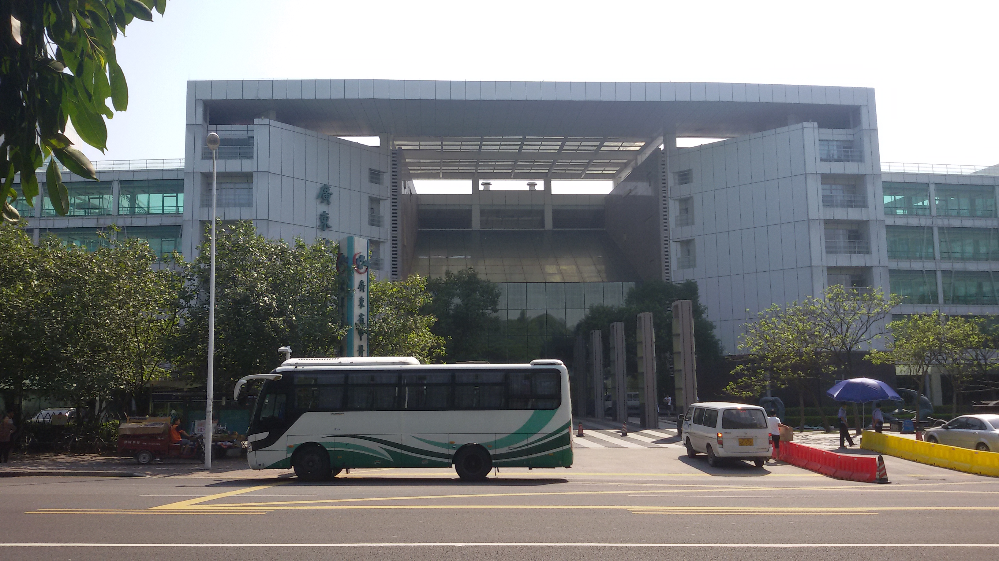 粵語: 廣東省中醫院（大學城分院）